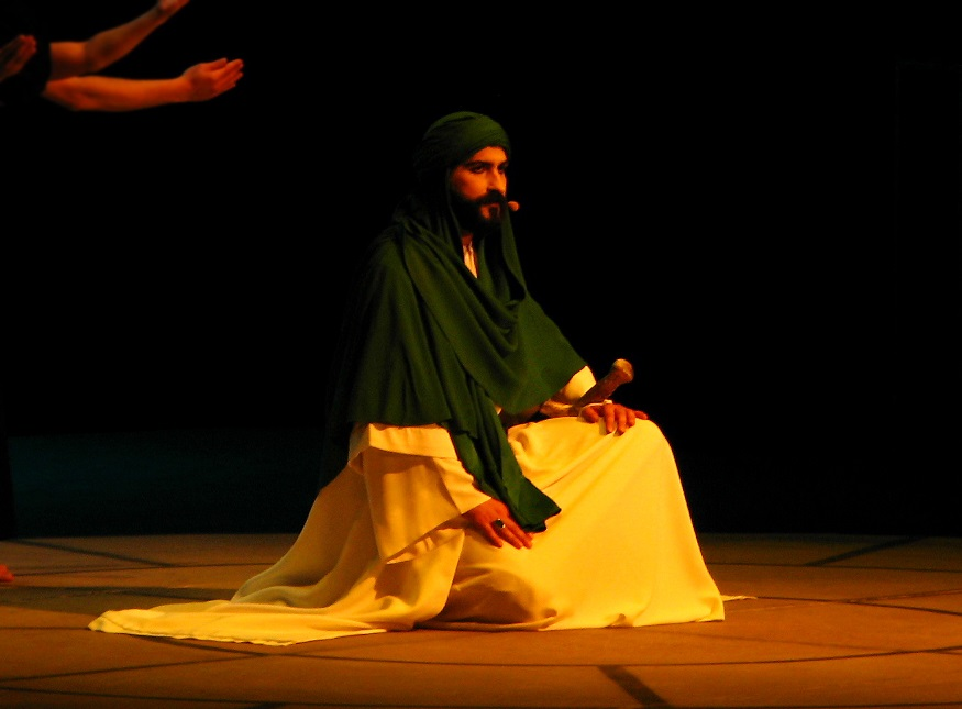 Kerbela oyununda "Hüseyin" rolünde Burak Davutoğlu